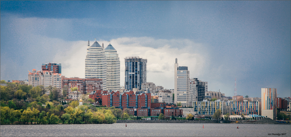 вид на "Нагірну" частину міста з лівого берегу